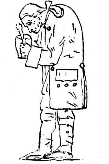 "Immanuel Kant, Senf zubereitend". Zeichnung, Friedrich Hagemann, entstanden 1801. (Eine liebevoll-ironische Darstellung des Philosophen.)